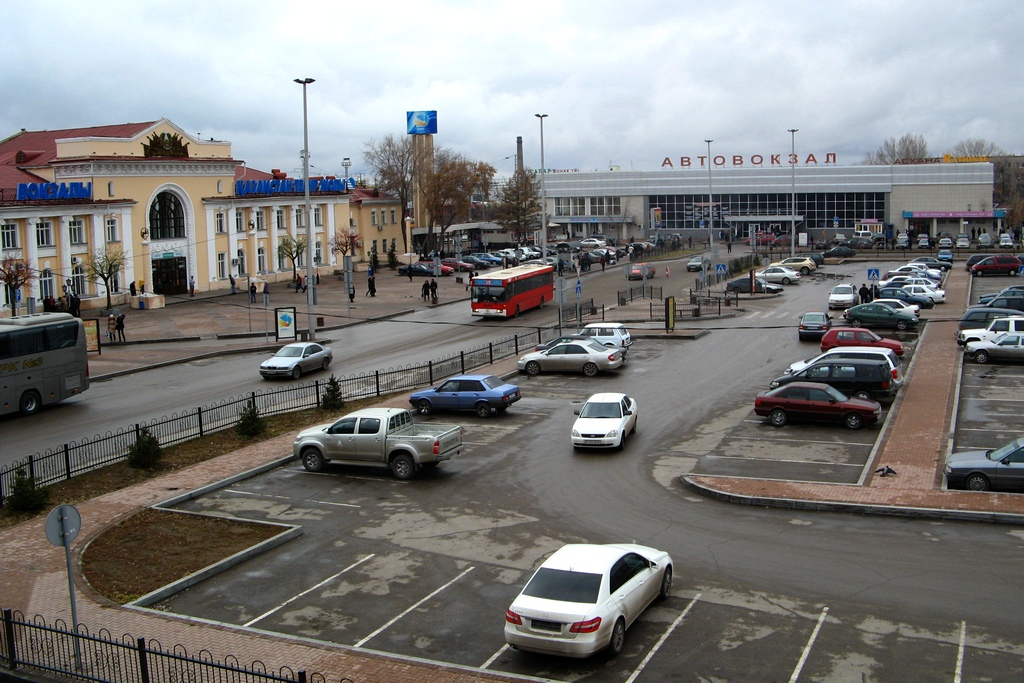 Привокзальная площадь